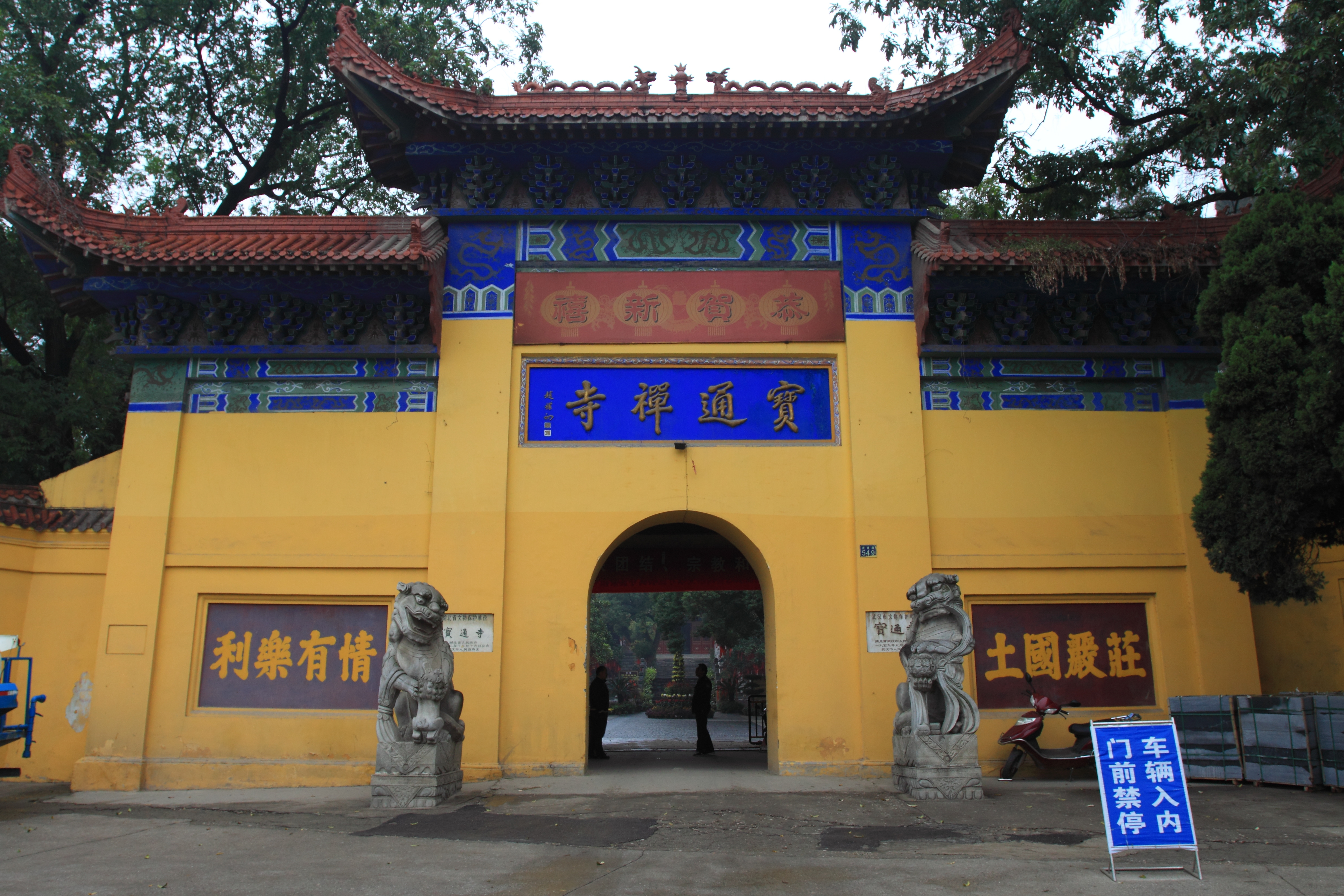 武汉市武昌区宝通寺 —— 山门